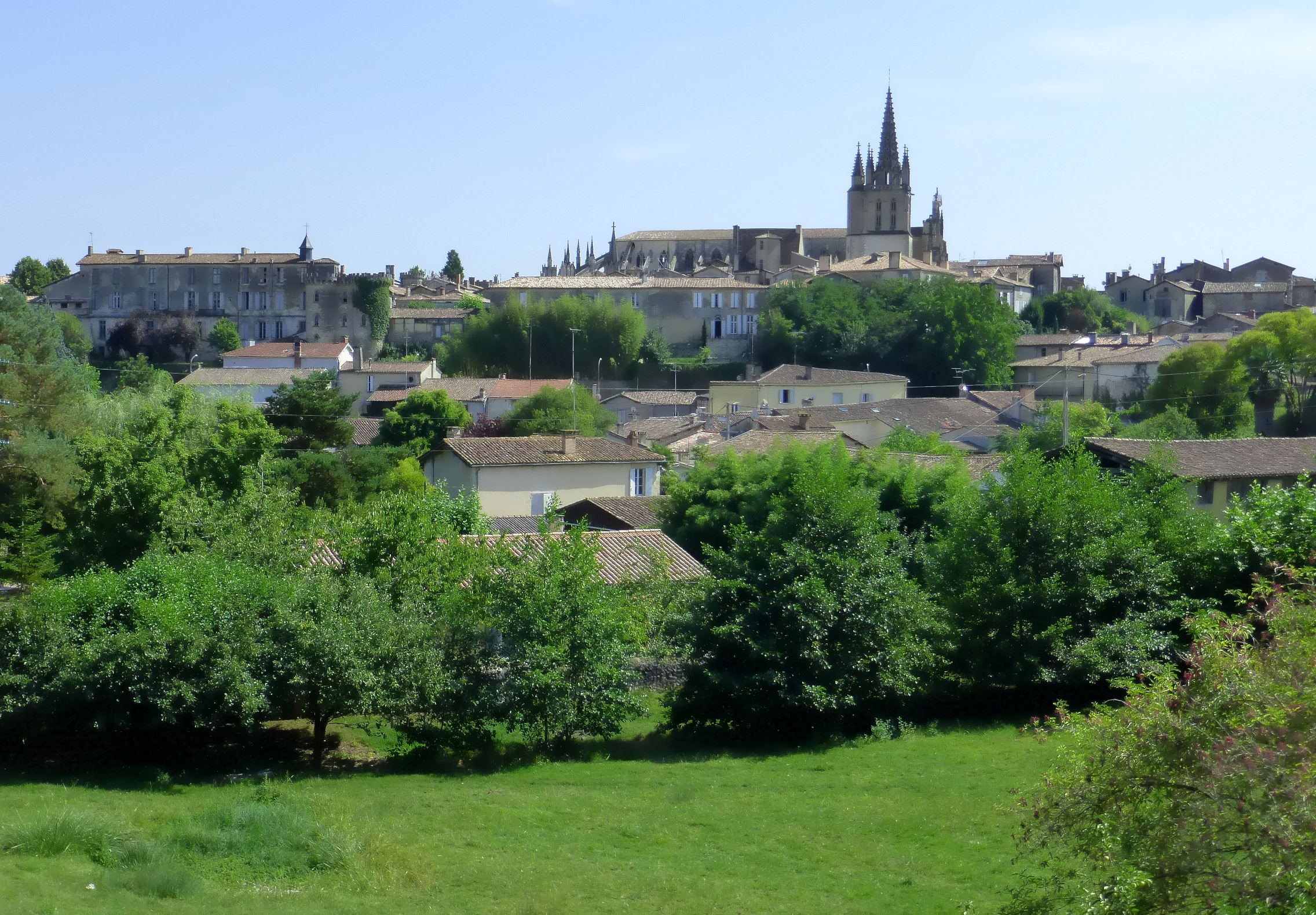 Bazas, Frankreich, von Westen gesehen